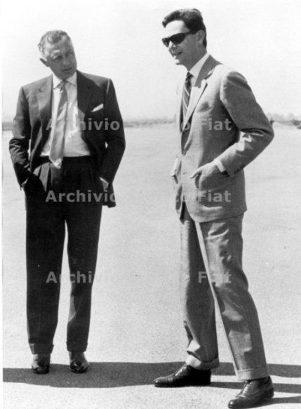 Gianni e Umberto Agnelli, 1965 (Archivio e centro storico Fiat, Archivio iconografico, Visite, b. V 9)